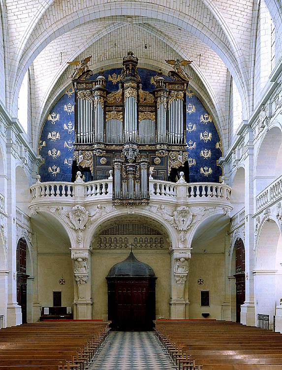 Les orgues du prytanée après la dernière restauration, laissant voir le mur bleu avec lys